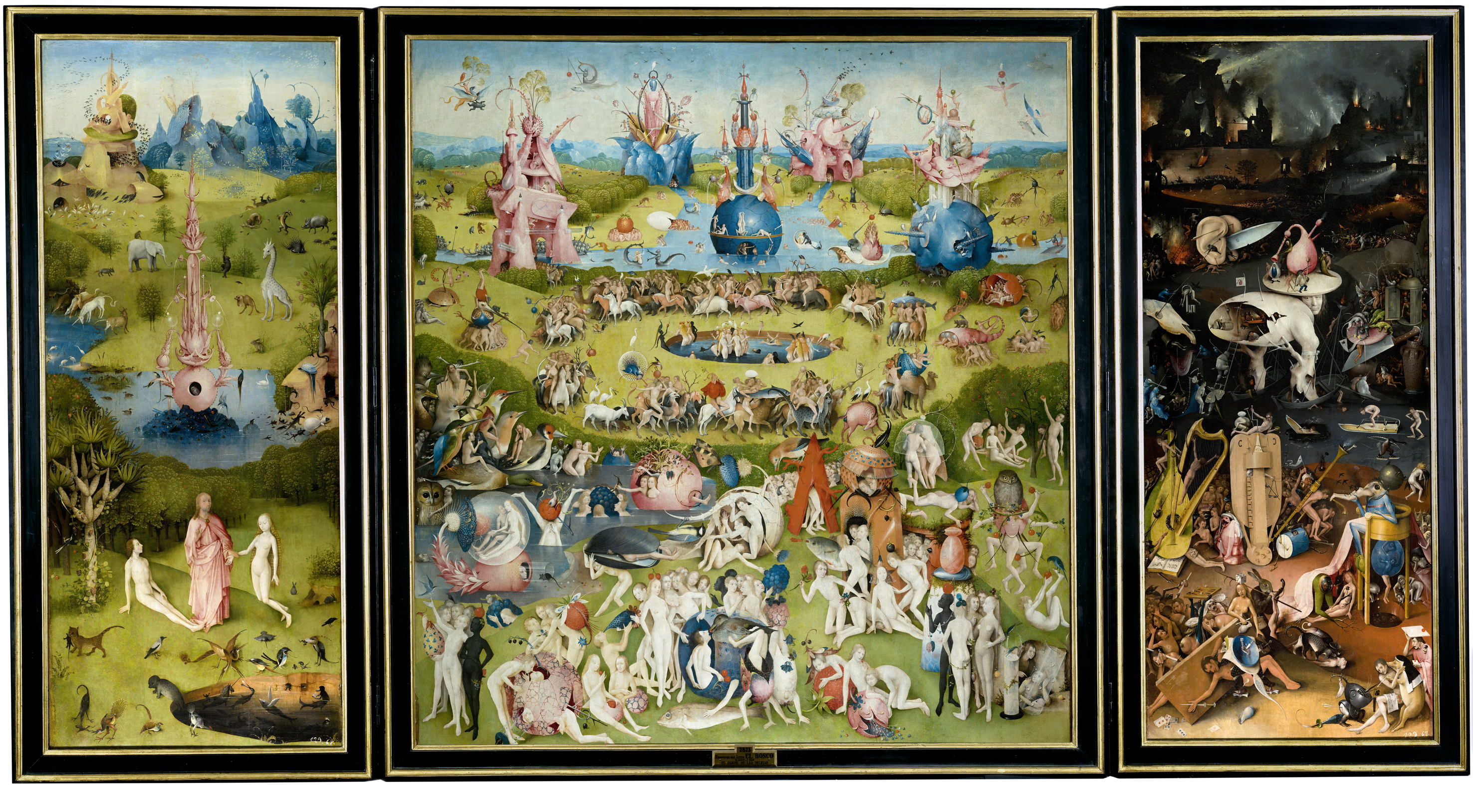 En el tríptico abierto se incluyen tres escenas. La tabla izquierda está dedicada al Paraíso, con la creación de Eva y la Fuente de la Vida, mientras la derecha muestra el Infierno. La tabla central da nombre al conjunto, al representarse en un jardín las delicias o placeres de la vida. Entre Paraíso e Infierno, estas delicias no son sino alusiones al Pecado, que muestran a la humanidad entregada a los diversos placeres mundanos. Son evidentes las representaciones de la Lujuria, de fuerte carga erótica, junto a otras de significado más enigmático. A través de la fugaz belleza de las flores o de la dulzura de las frutas, se transmite un mensaje de fragilidad, del carácter efímero de la felicidad y del goce del placer. Así parecen corroborarlo ciertos grupos, como la pareja encerrada en un globo de cristal en el lado izquierdo, en probable alusión al refrán flamenco: “La felicidad es como el vidrio, se rompe pronto”. El tríptico cerrado representa en grisalla el tercer día de la creación del Mundo, con Dios Padre como Creador, según sendas inscripciones en cada tabla: “Él mismo lo dijo y todo fue hecho” y “Él mismo lo ordenó y todo fue creado” Génesis (1:9-13). Obra de carácter moralizante, es una de las creaciones más enigmáticas, complejas y bellas de El Bosco, realizada en la última etapa de su vida. Adquirida en la almoneda del prior don Fernando, hijo natural del gran duque de Alba, Felipe II la llevó a El Escorial en 1593.